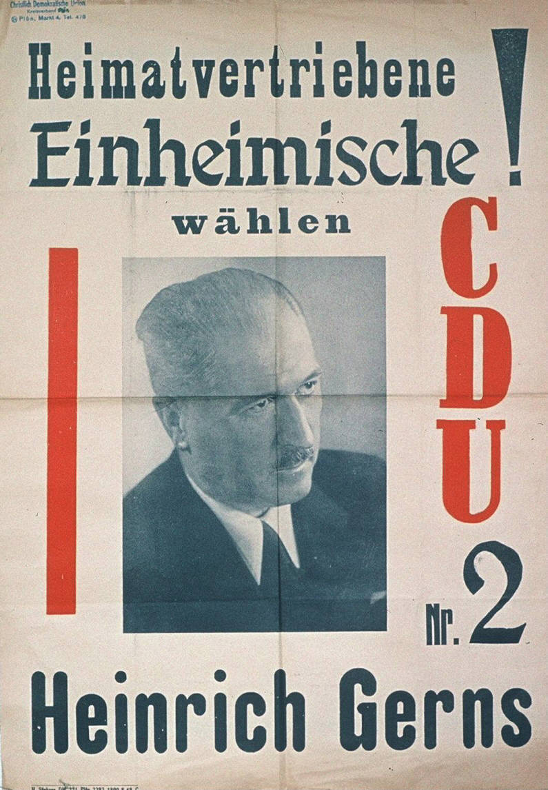 Heimatvertriebene Einheimische wählen CDU Nr.2 Heinrich Gerns Abbildung: Porträtfoto Kommentar: Plön Plakatart: Kandidaten-/Personenplakat mit Porträt Drucker_Druckart_Druckort: H. Sönksen DM 221, Plön Objekt-Signatur: 10-001: 115 Bestand: Plakate zu Bundestagswahlen (10-001) GliederungBestand10-18: Plakate zu Bundestagswahlen (10-001) » Die 1. Bundestagswahl am 14. August 1949 » CDU » Mit Porträtfoto Lizenz: KAS/ACDP 10-001: 115 CC-BY-SA 3.0 DE